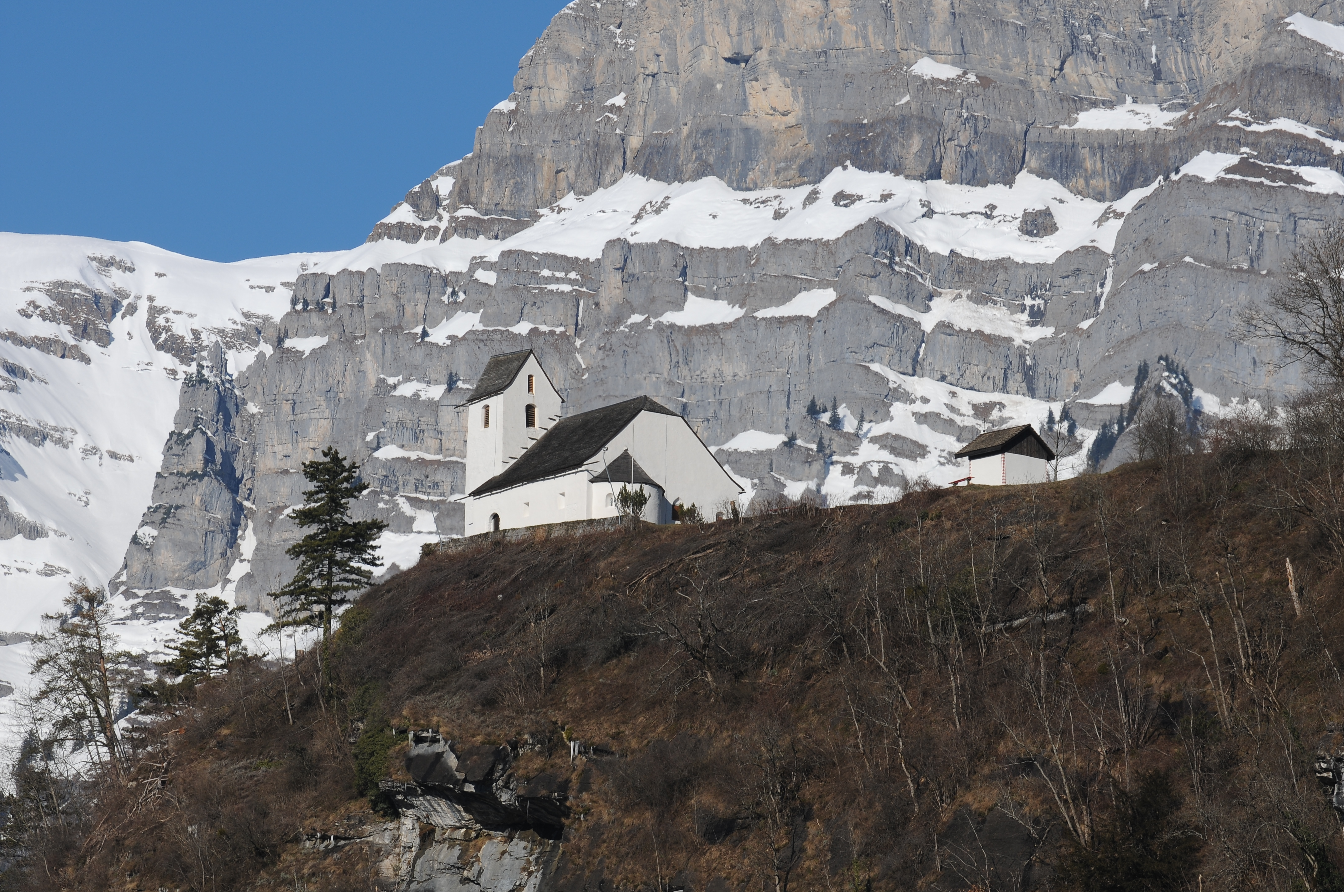 Die St. Georgskapelle (in lokalem Dialekt Sant Jöüri) gilt als die älteste romanische Kapelle der Ostschweiz und ist das einzige in der Schweiz erhalten gebliebene Beispiel eines zweischiffigen Gewölbebaues. Sie ragt über das Dorf Berschis an einer Felszinne in die Höhe und ist damit eines der markantesten Kunstdenkmäler auf dem Weg zwischen Zürich und Chur.